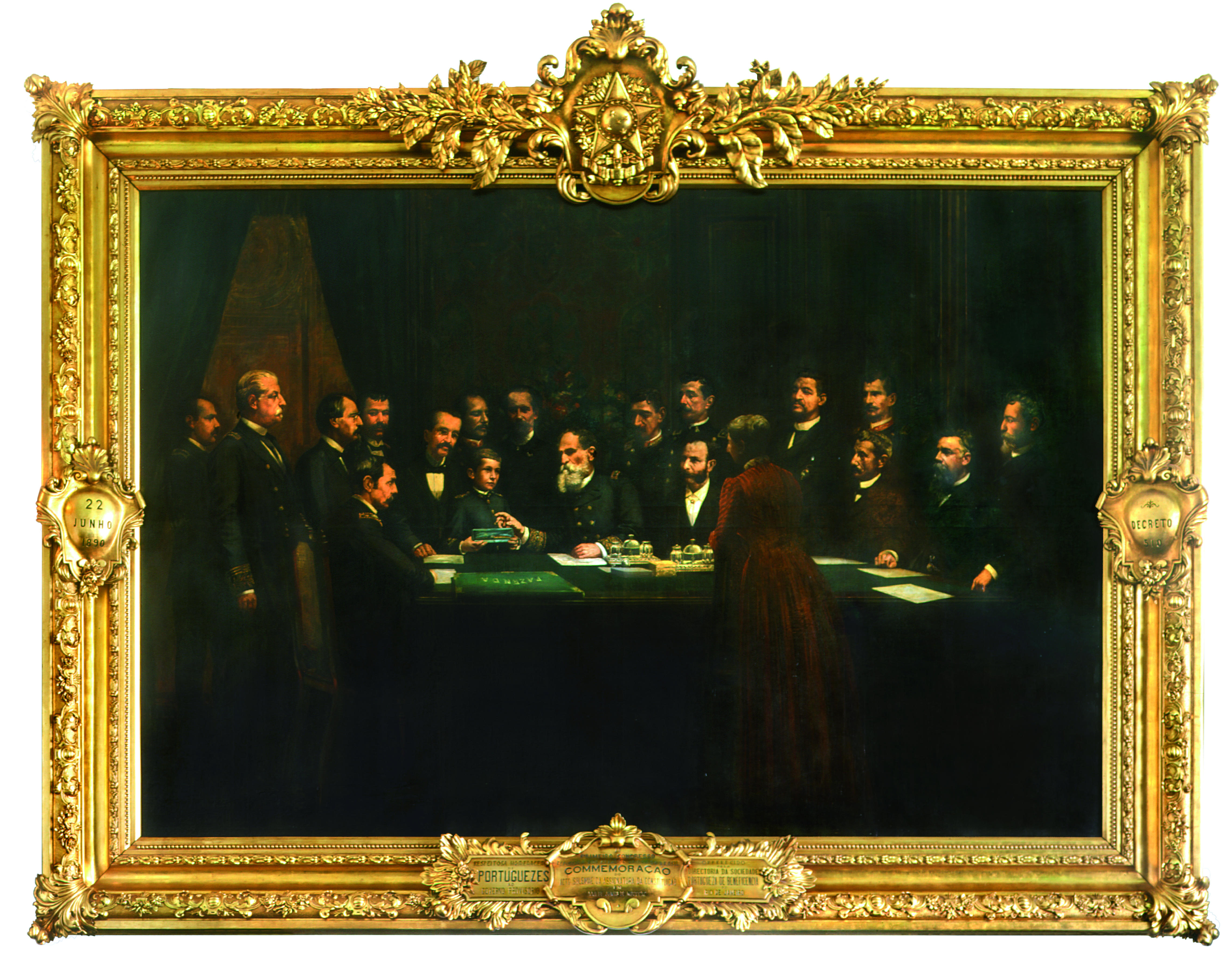 Título: Ato de assinatura do Projeto da 1ª Constituição Autor: Gustavo Hastoy Ano: 1891 Técnica: Óleo sobre tela Dimensão: 290 cm x 441 cm